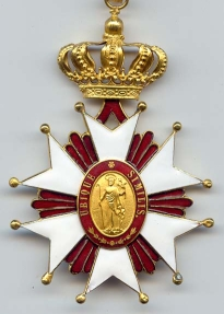 Croce di cavaliere dell'Ordine di San Giuseppe. Foto Domenico Serlupi Licenza GFDL